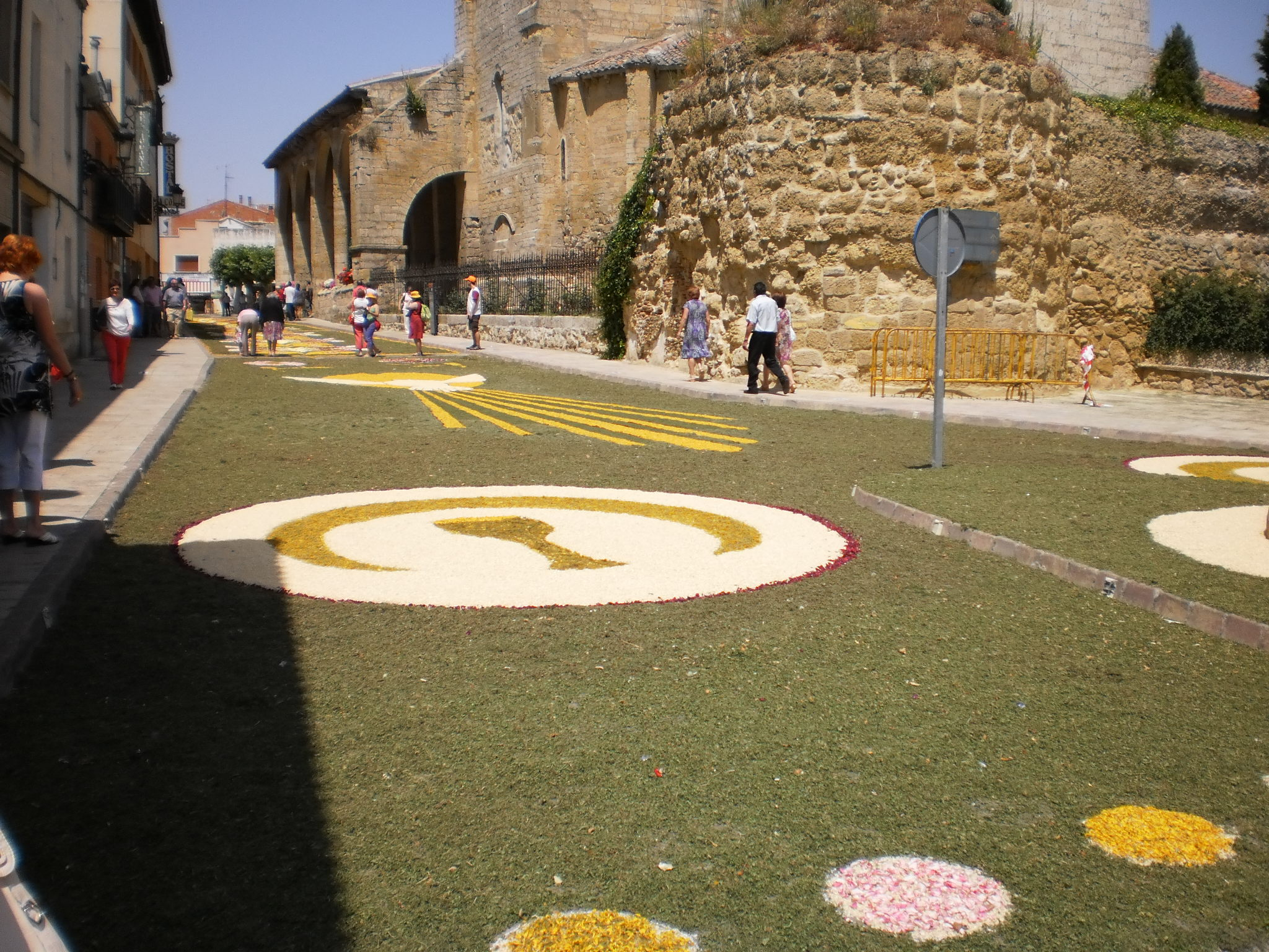 Alfombras florales en Carrión de los Condes